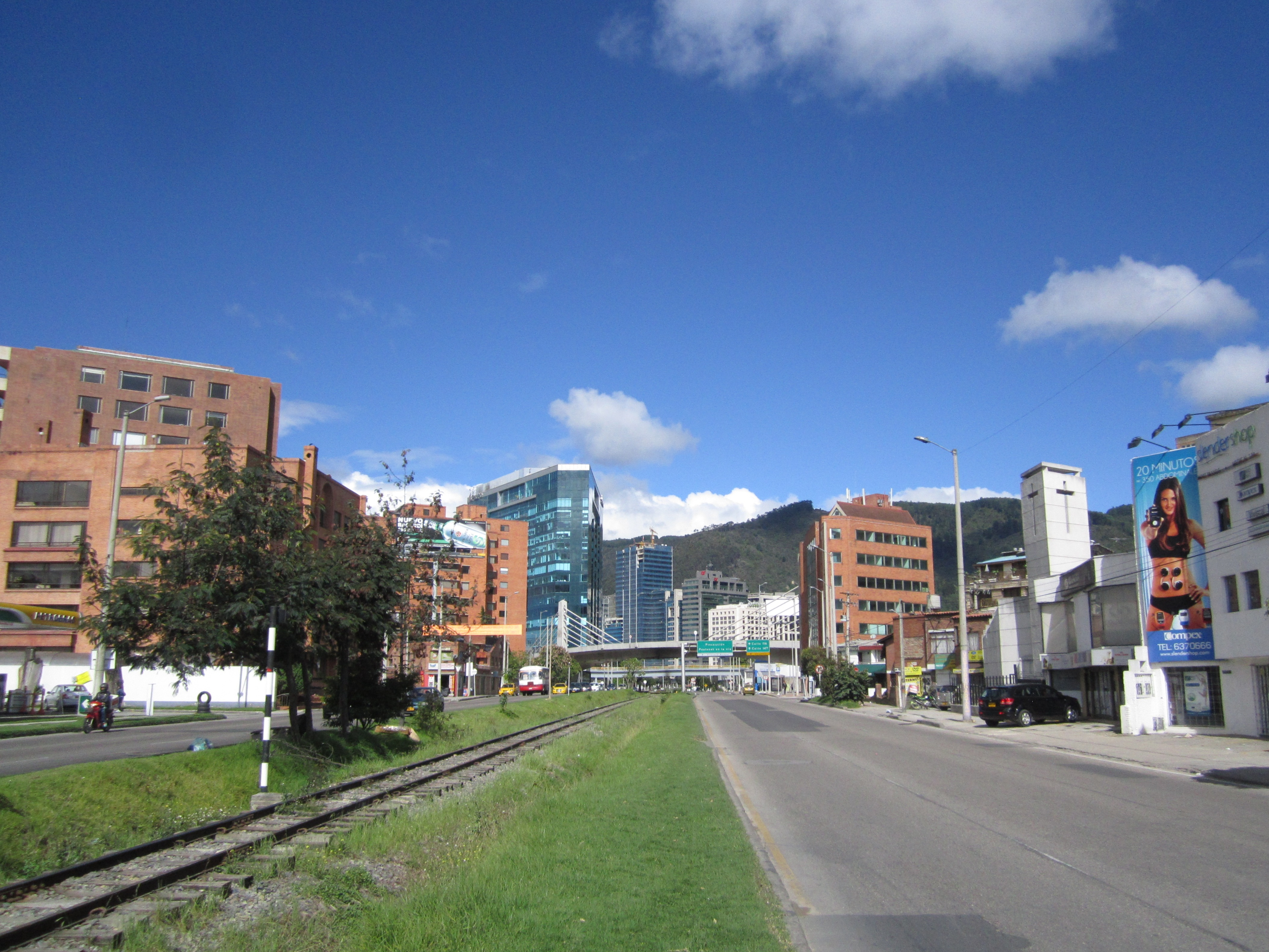 Avenida carrera Novena o NQS (de Norte-Quito-Sur) hacia el norte vista desde la calle 104, en la localidad de Usaquén, al norte de Bogotá.